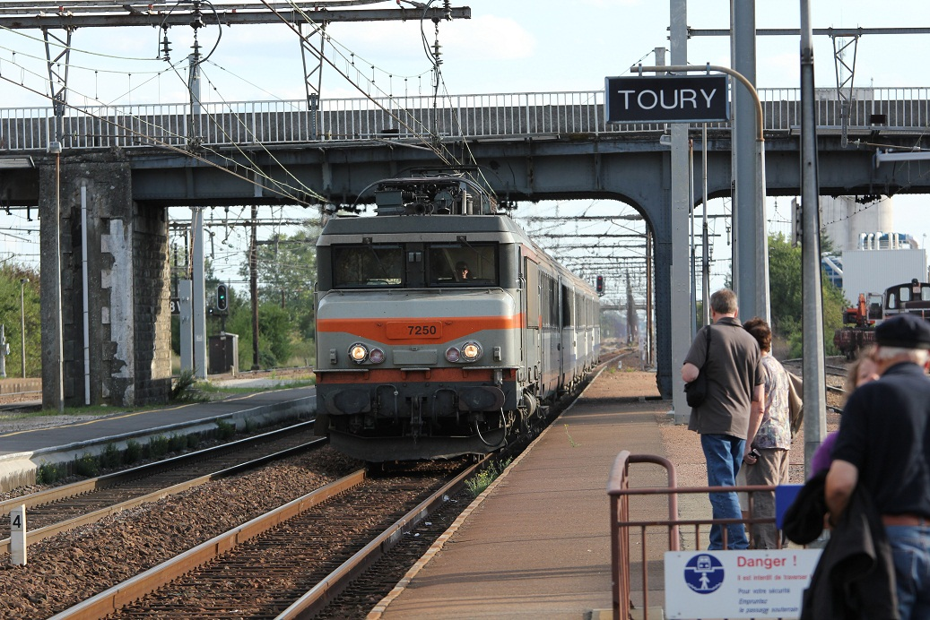 Arrivée d'un train en gare de Toury, Eure et Loir, Centre, France.